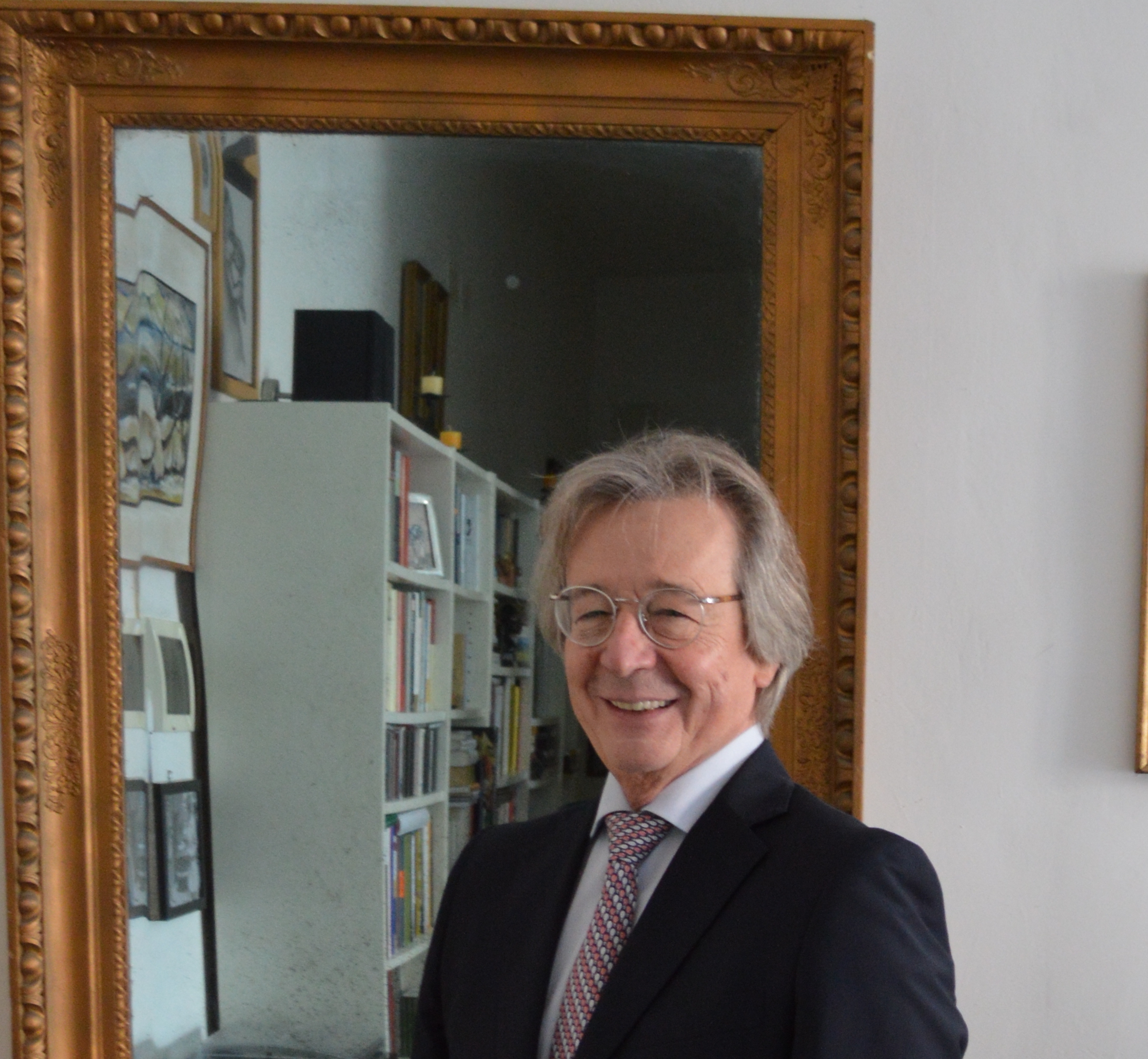 Silvije Tomašević